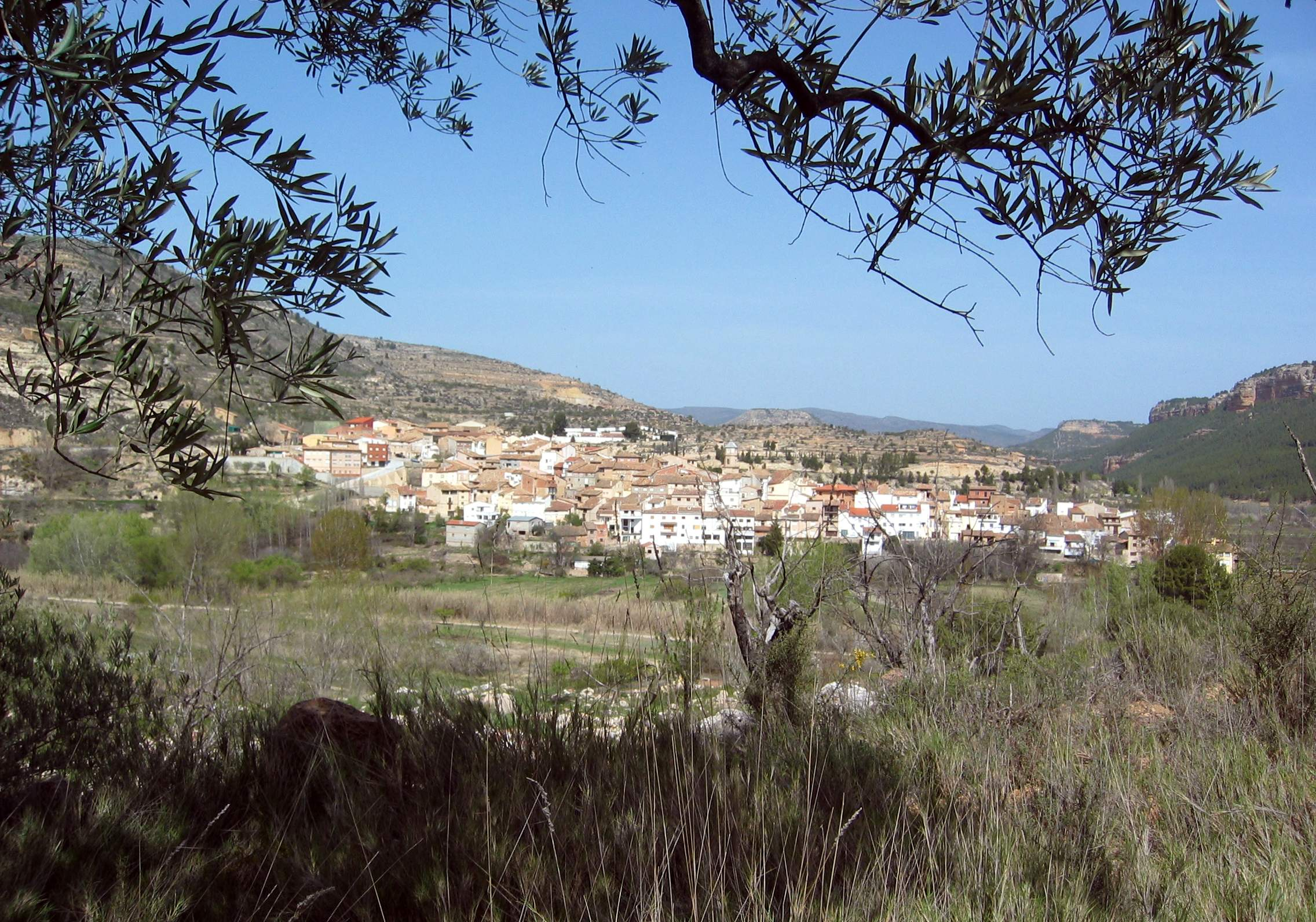 Vista meridional de Casasaltas (Valencia).